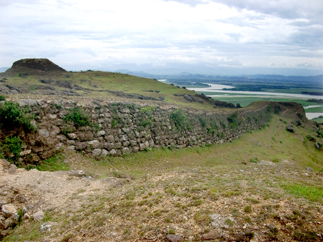 Một đoạn thành trên núi Lam Thành, nhìn ra phía trước là sông Lam và núi Hồng Lĩnh. Mô đất phía bên trái là cột cờ Trương Phụ trên đỉnh núi.